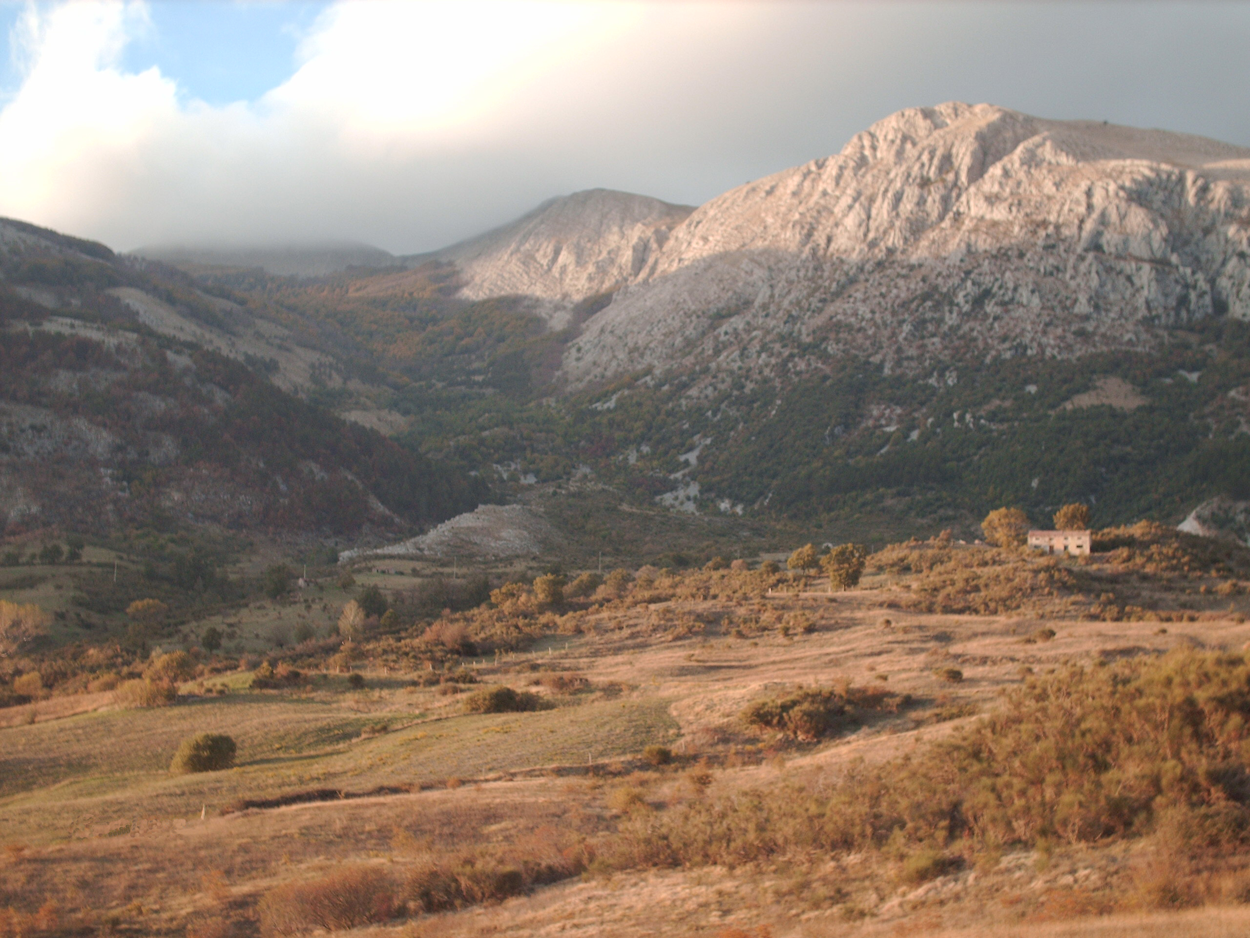 Il Monte Alpi in autunno. In autunno la montagna si tinge di rosso.